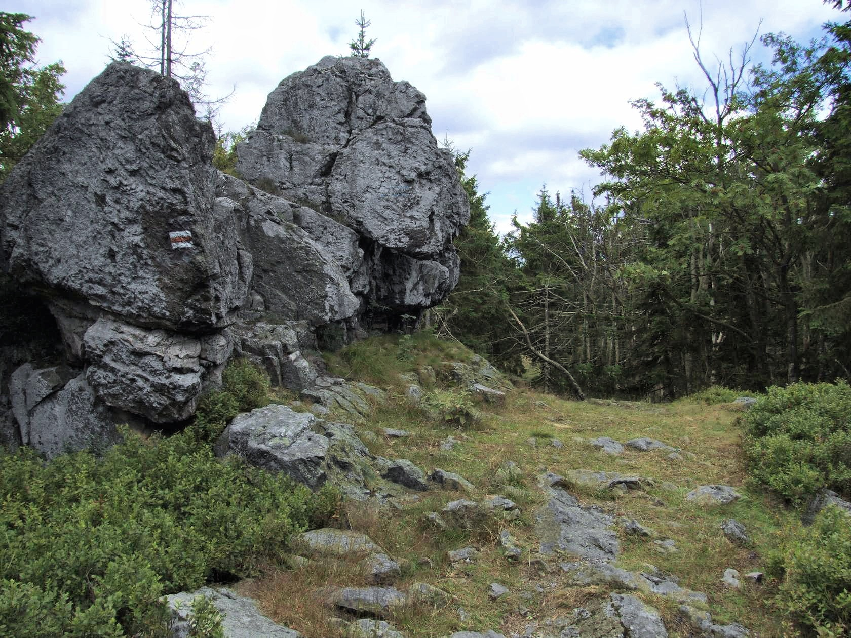 Zawalidroga (Jizerské hory)